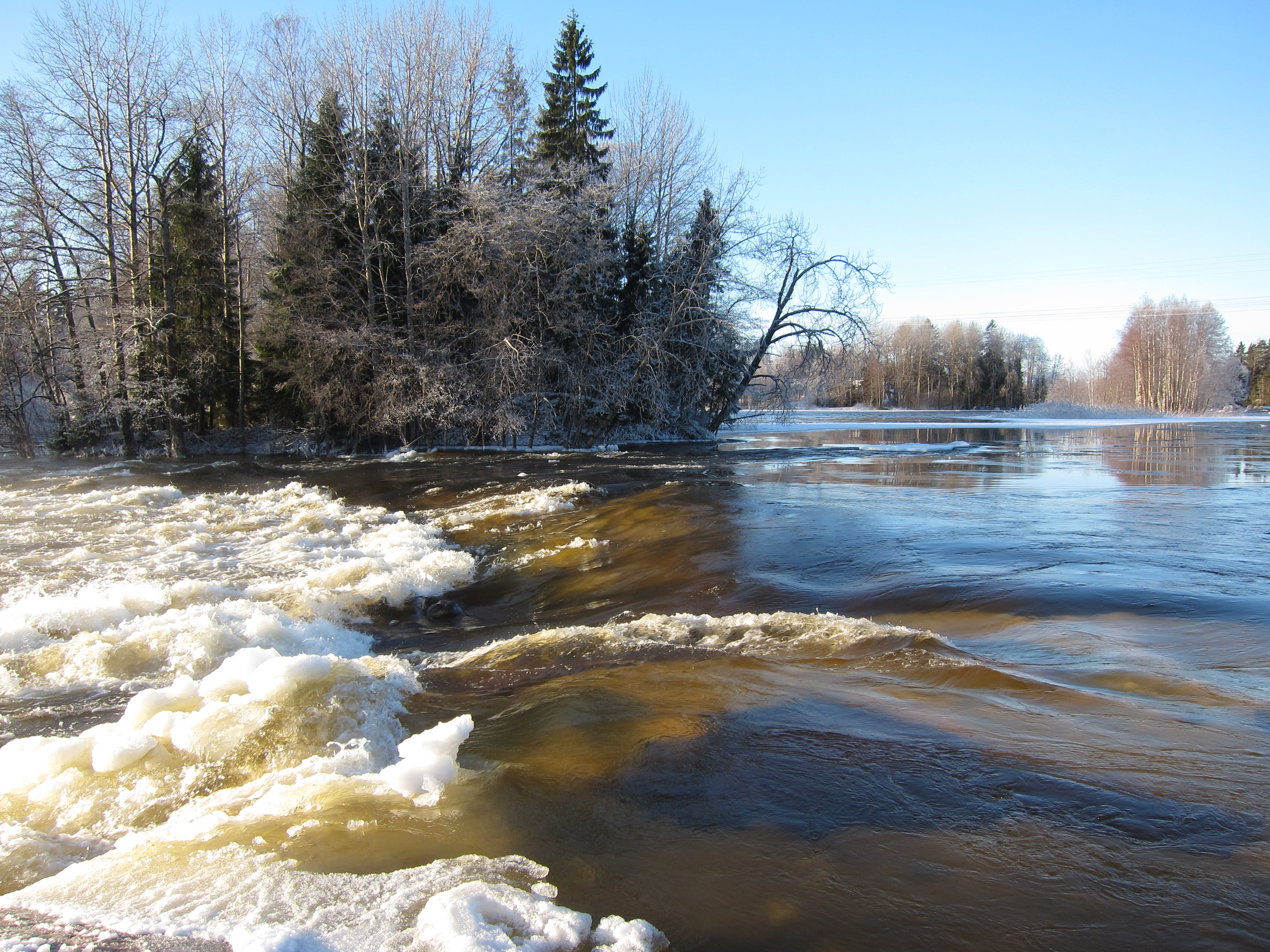 Supon eli hyydön muodostumista Kymijoen Pernoonkoskissa Kotkassa Suomessa.